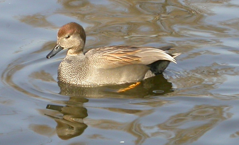 罗纹鸭，幼雄，摄于北京动物园，自拍。